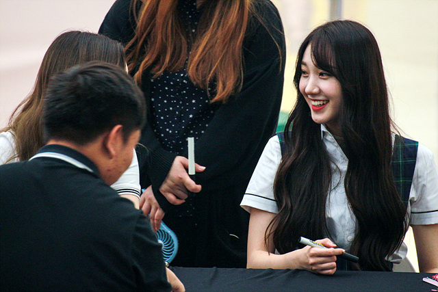 170910 프리스틴 팬싸인회